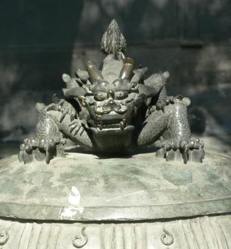 普牢 拍摄